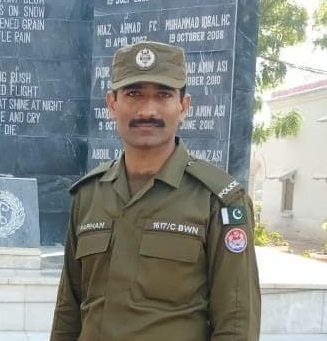 محمد فرحان اشرف